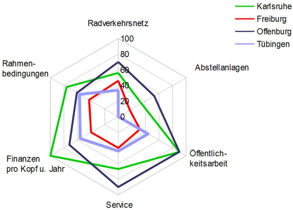 Rad-Verkehrspolitik Tübingen